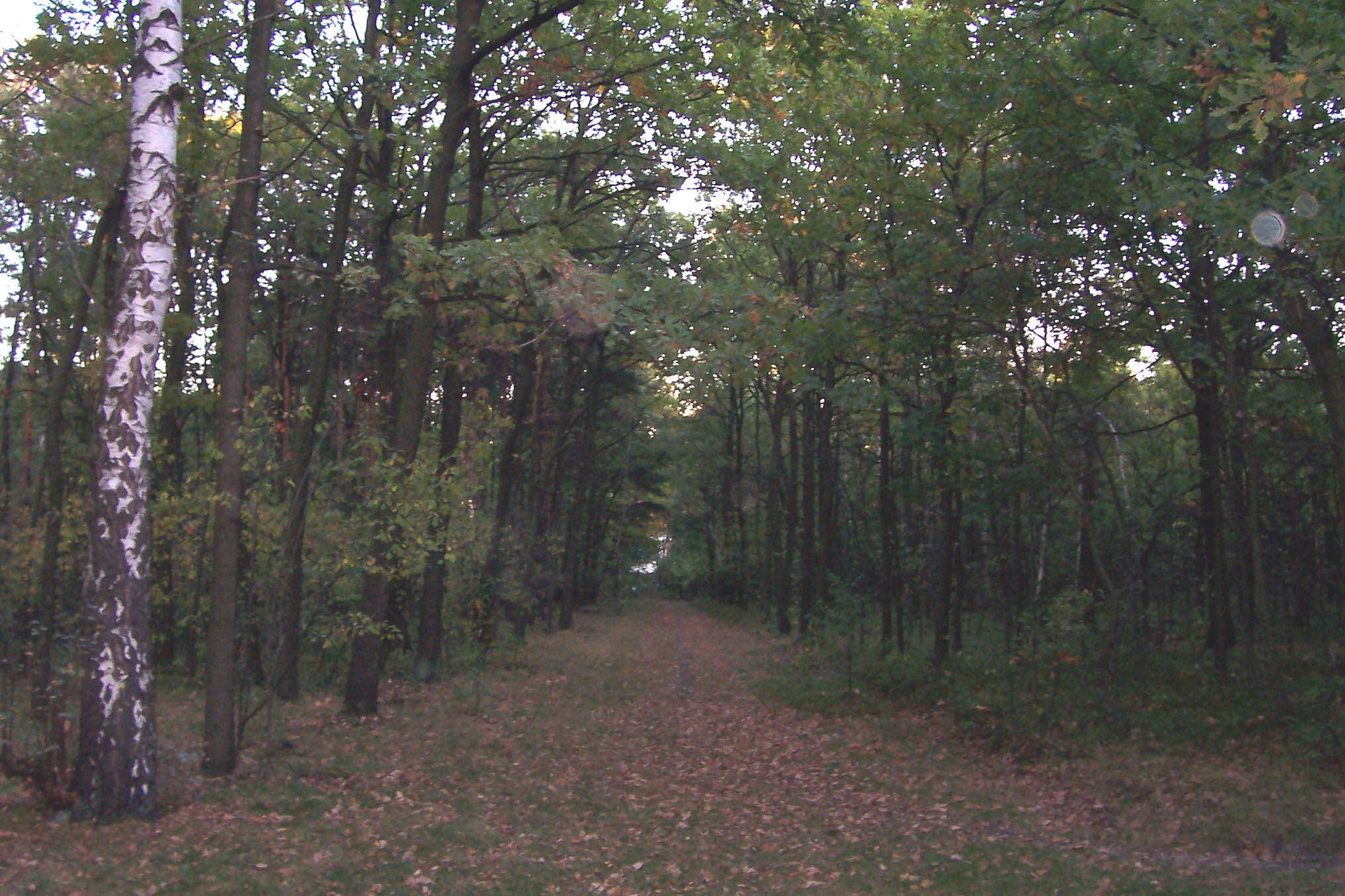 Forest in Katowice-Panewniki